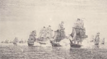 Combate de Lara-Quilmes, Guerra del Brasil